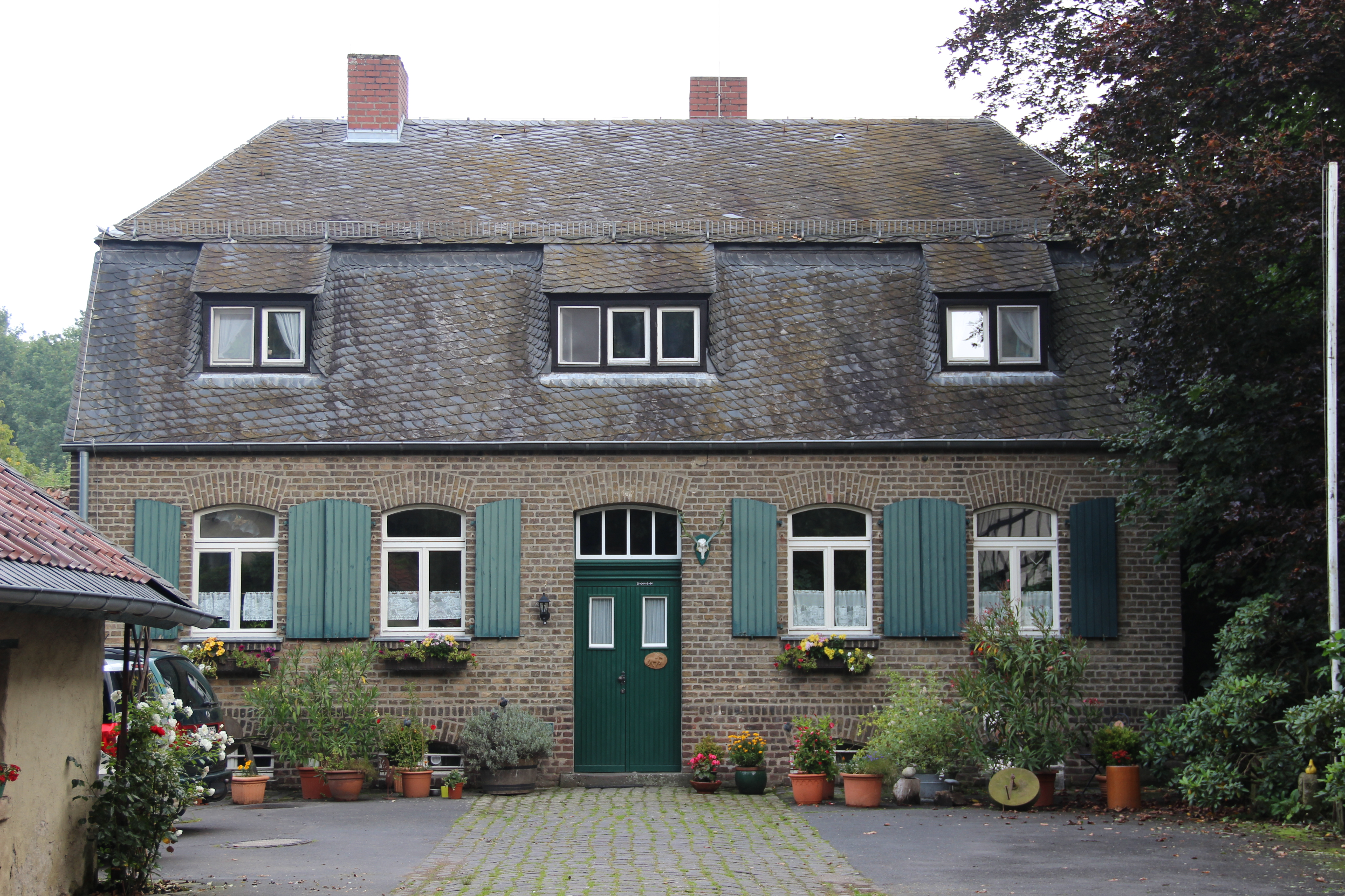 Forstdienstgebäude „Schönwaldhaus“ im Kottenforst, Villiper AlleeThis is a photograph of an architectural monument. 643